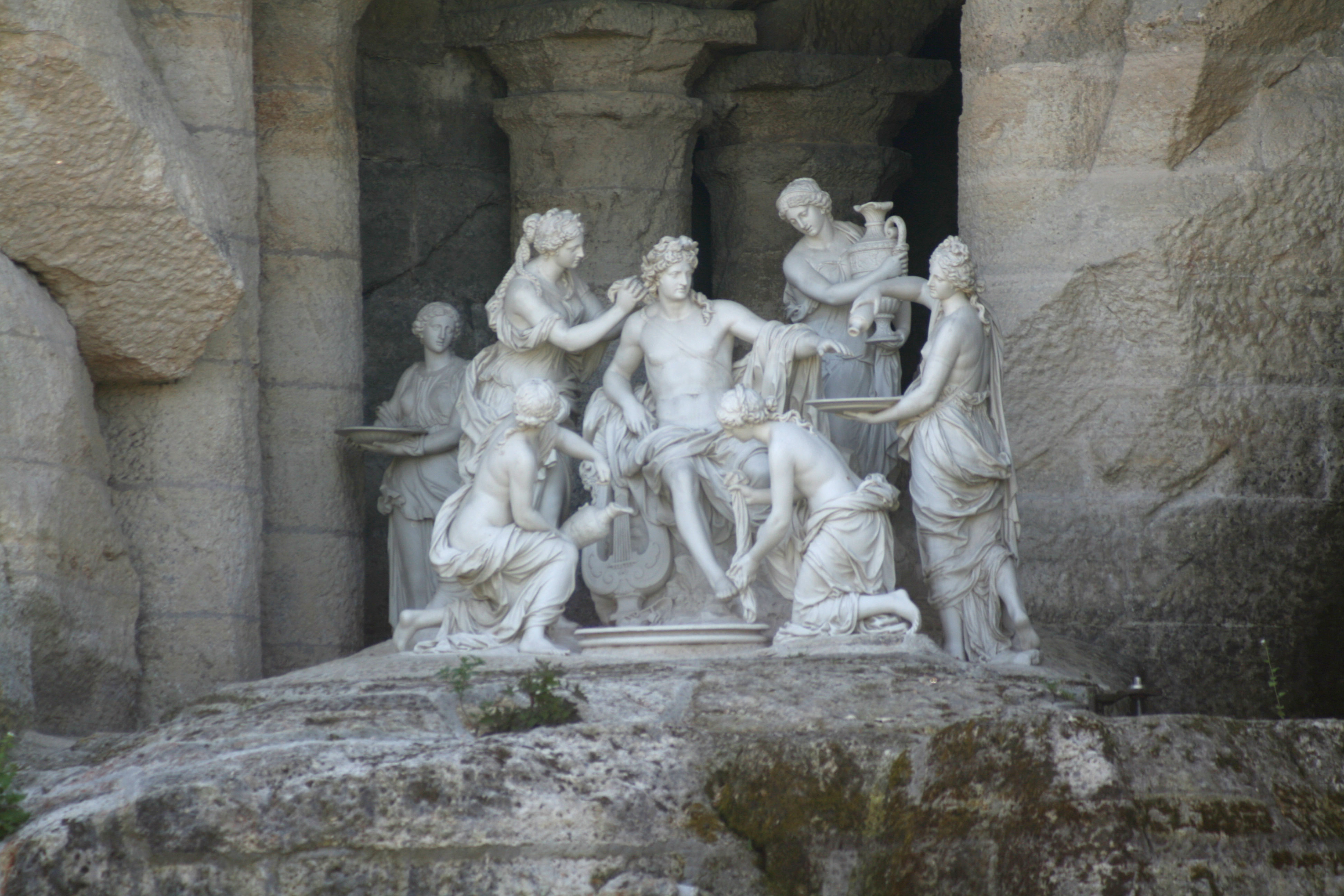 Apollon accompagné de cinq nymphes, dans la grotte du Bosquet des bains d'Apollon, au Château de Versailles. L'oeuvre a été réalisée par Girardon et Regnaudin.